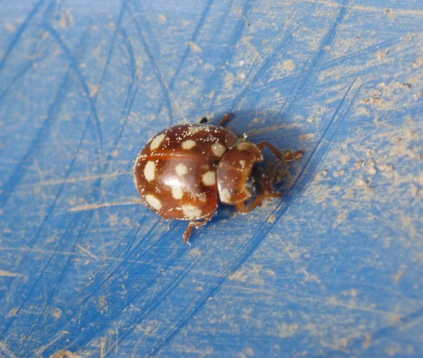 Calvia quatuordecimguttata